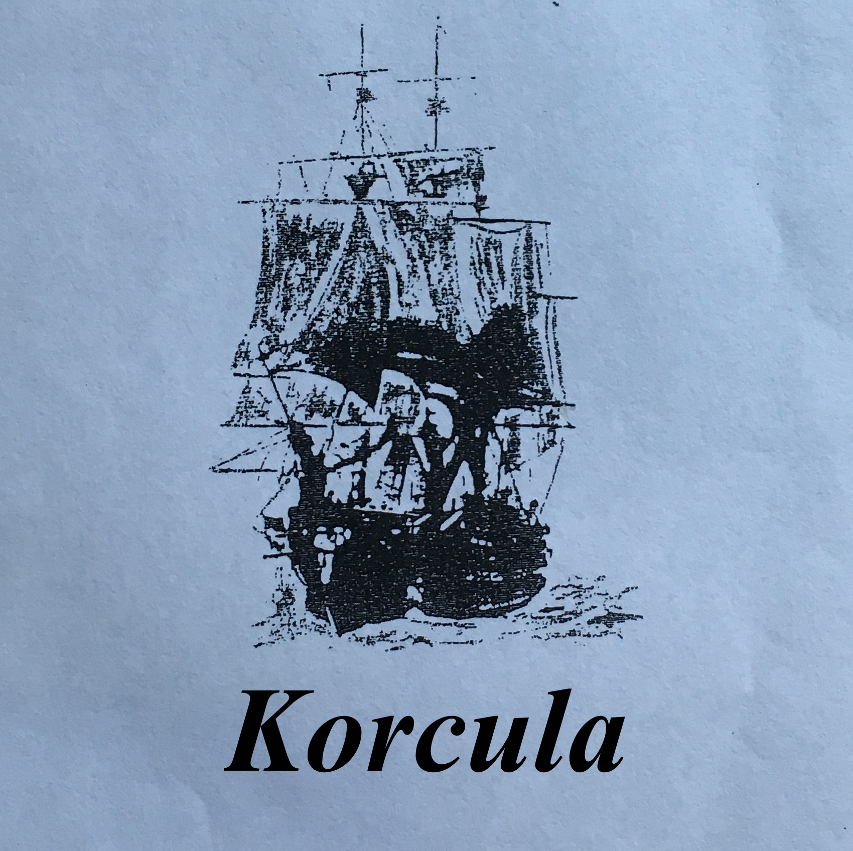 Gert Ledigs unveröffentlichtes Werk "Korcula"